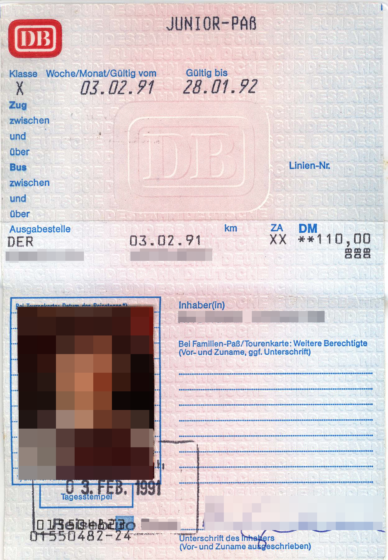 Junior-Pass der Deutschen Bahn 1991. Name des Inhabers, Bild und ausstellendes Büro wurden anonymisiert